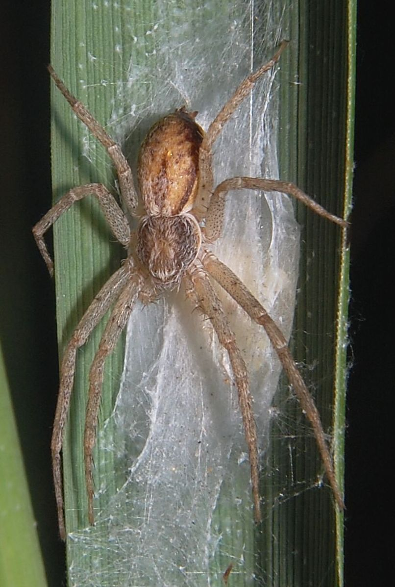 Philodromus dispar, Weibchen auf Eikokon. Forst Jungfernheide, Berlin. det. (genitalmorphologisch) K.-H. Kielhorn, Berlin